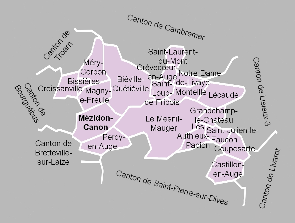 Carte du canton de Mézidon-Canon en 2012.